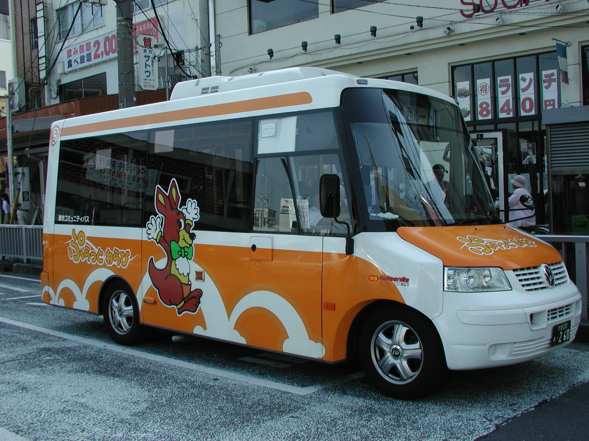 「蕨市コミュニティバス『ぷらっとわらび』」専用車両（クセニッツCITY-II/国際興業戸田営業所所属：社番・205） 蕨駅西口にて